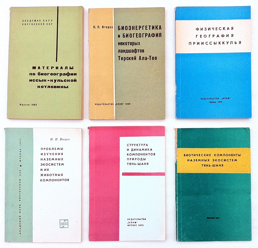 Книги П. П. Второва